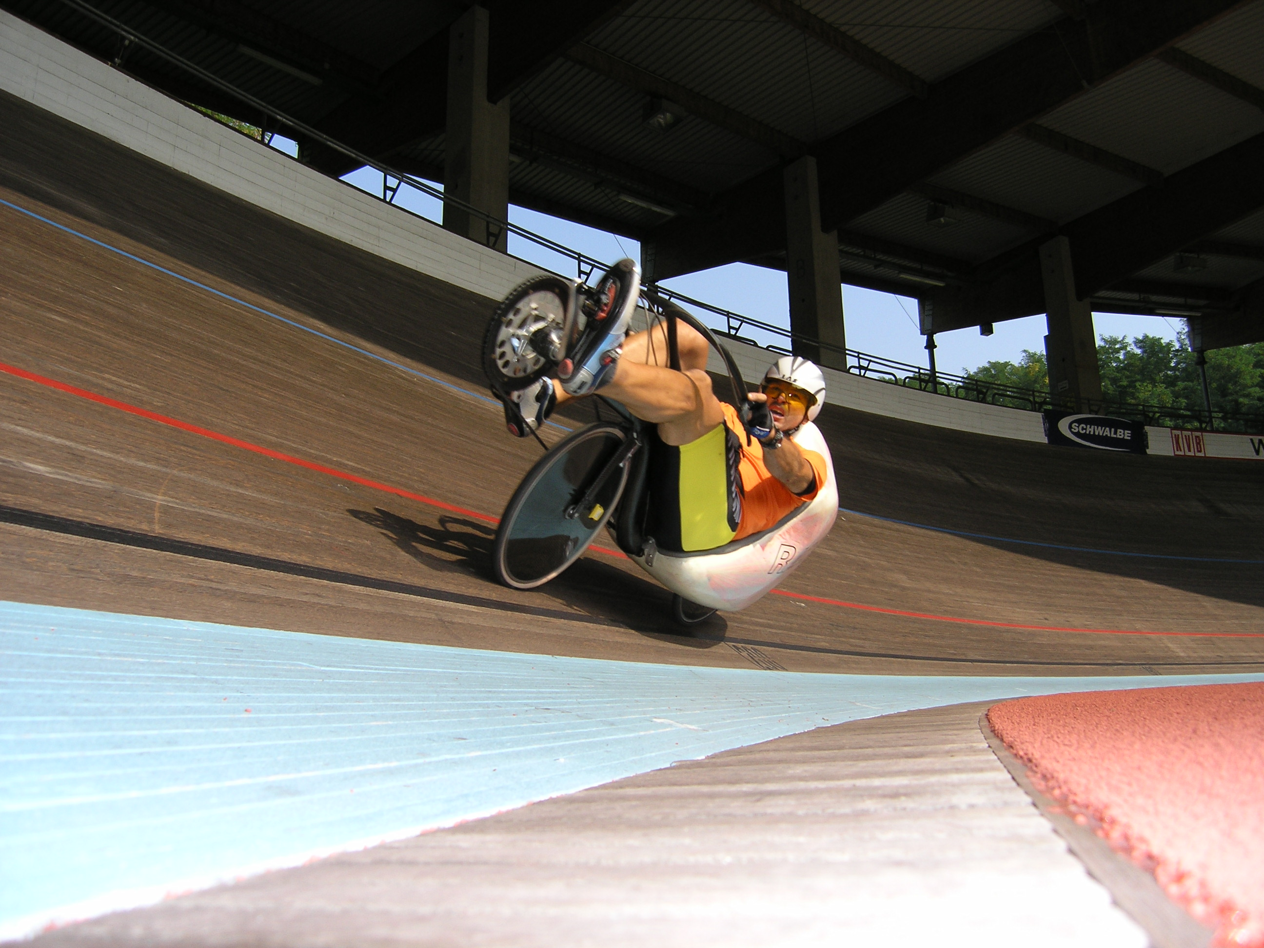 Drei Liegeradtypen im Vergleich